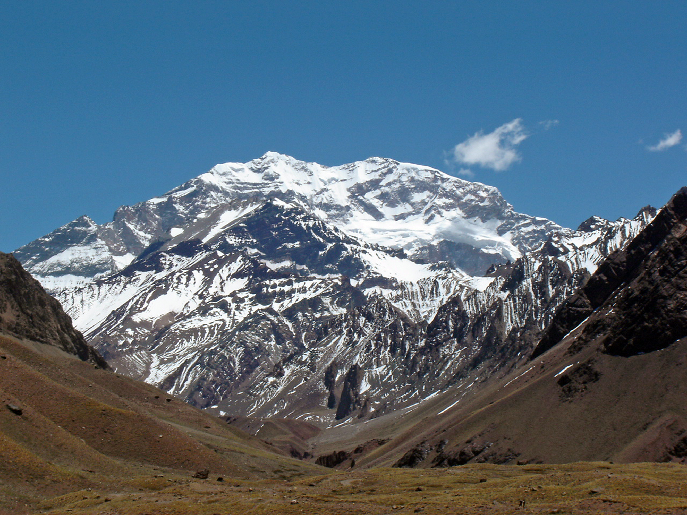 Aconcagua mountain, from entrance Parque Provincial Aconcagua, ARG